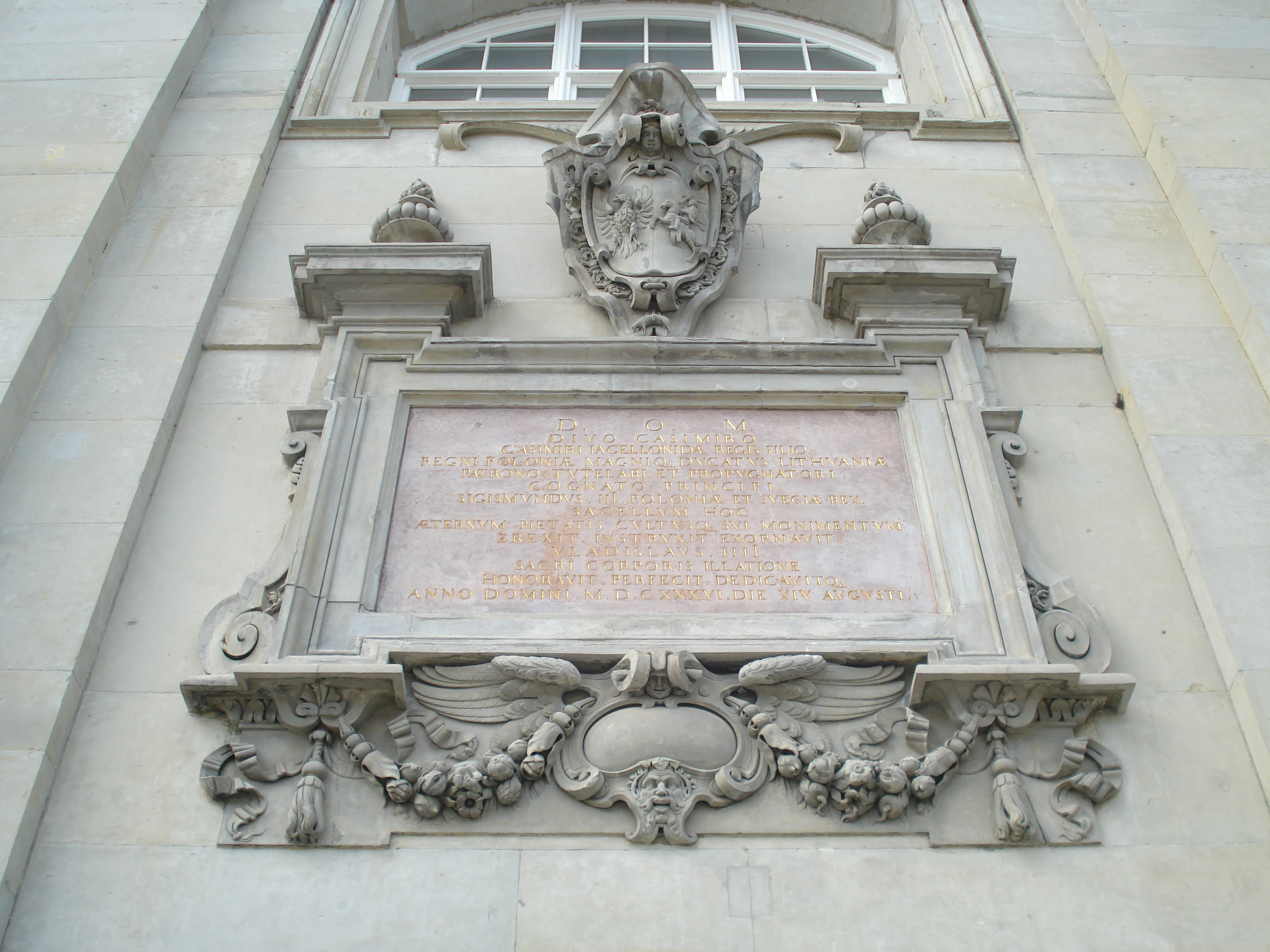 Tablica erekcyjna Kaplica św. Kazimierza, Wilno: D.O.M. / DIVO CASIMIRO / CASIMIRI JAGIELLONIDAE REGIS FILIO / REGNI POLONIAE MAGNIQ DUCATUS / LITHUANIAE / PATRONO TUTELARI PROPUGNATORI / COGNATO PRINCIPI / SIGISMUNDUS III POLONIAE ET SVECIAE / REX SACELLUM HOC / AETARNUM PIETATIS / CULTUSQE SUI / MONUMENTUM / EREXIT INSTRUXIT EXORNAVIT / VLADISLAUS IV / SACRI CORPORIS ILLATIONE / HONORAVIT PERFECIT DEDICAVITQE / ANNO DOMINI / MDCXXXVI DIE XIV / AUGUSTILietuvių: Šv. Kazimiero koplyčios fundacijos memorialinė lenta. Vilnius. Teksto vertimas: Geriausiajam galingiausiajam Dievui. Šventajam Kazimierui, karaliaus Kazimiero Jogailaičio sūnui, Lenkijos karalystės ir Lietuvos Didžiosios Kunigaikštystės globėjui, saugotojui ir gynėjui, princui ir giminaičiui, Zigmantas III, Lenkijos ir Švedijos karalius, pastatė, aprūpino ir išpuošė šią koplyčią, amžiną savo pamaldumo ir pagarbos paminklą. Vladislovas IV, perkėlęs šventojo kūną, [šią koplyčią] pagerbė, pabaigė ir paskyrė 1636 Viešpaties metų rugpjūčio 14 dieną